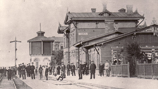 Здание вокзала и водонапорная башня станции "Тапс", 1896 год